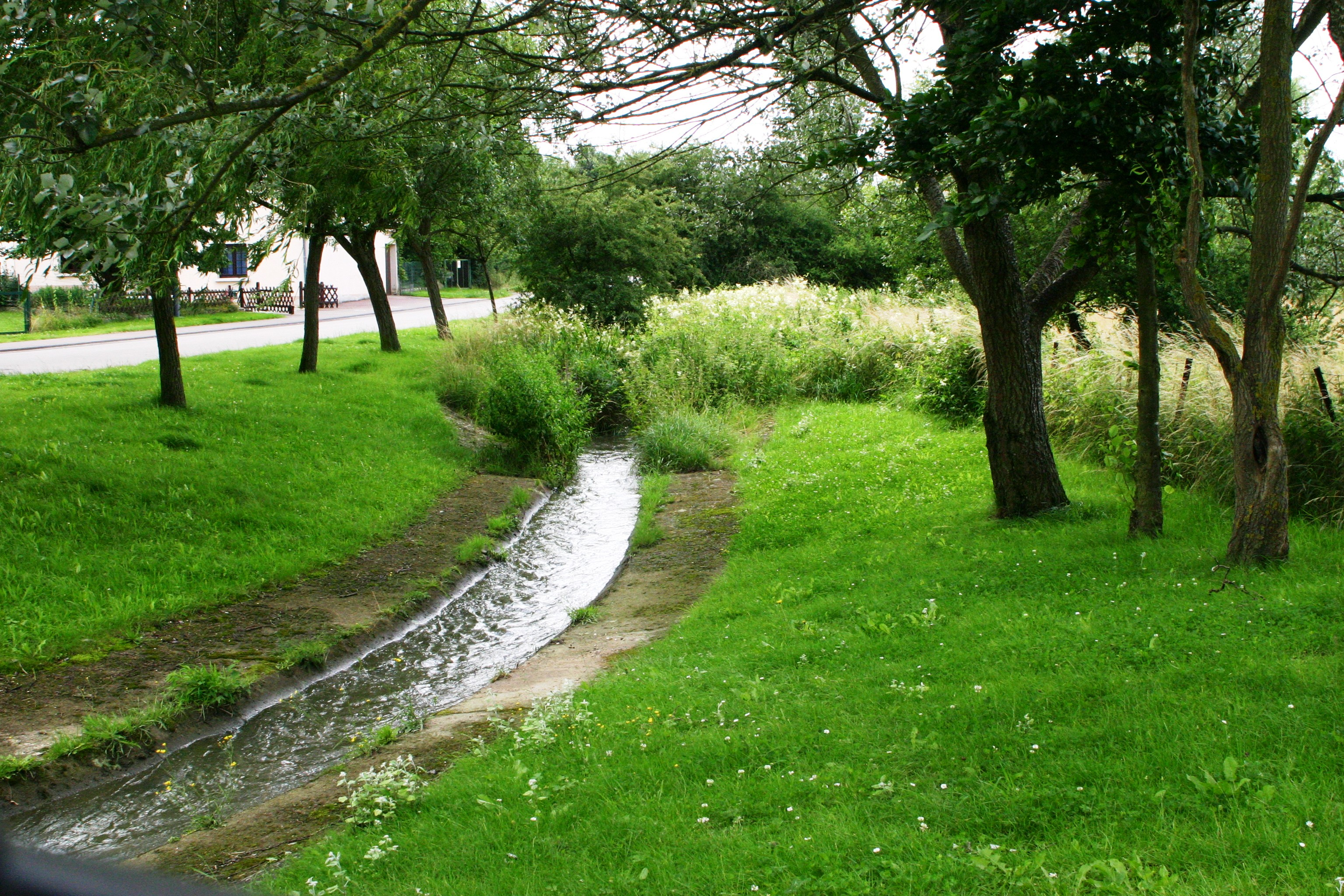 D'Péitrus zu Bartreng vun der Natur an de Bëtong.